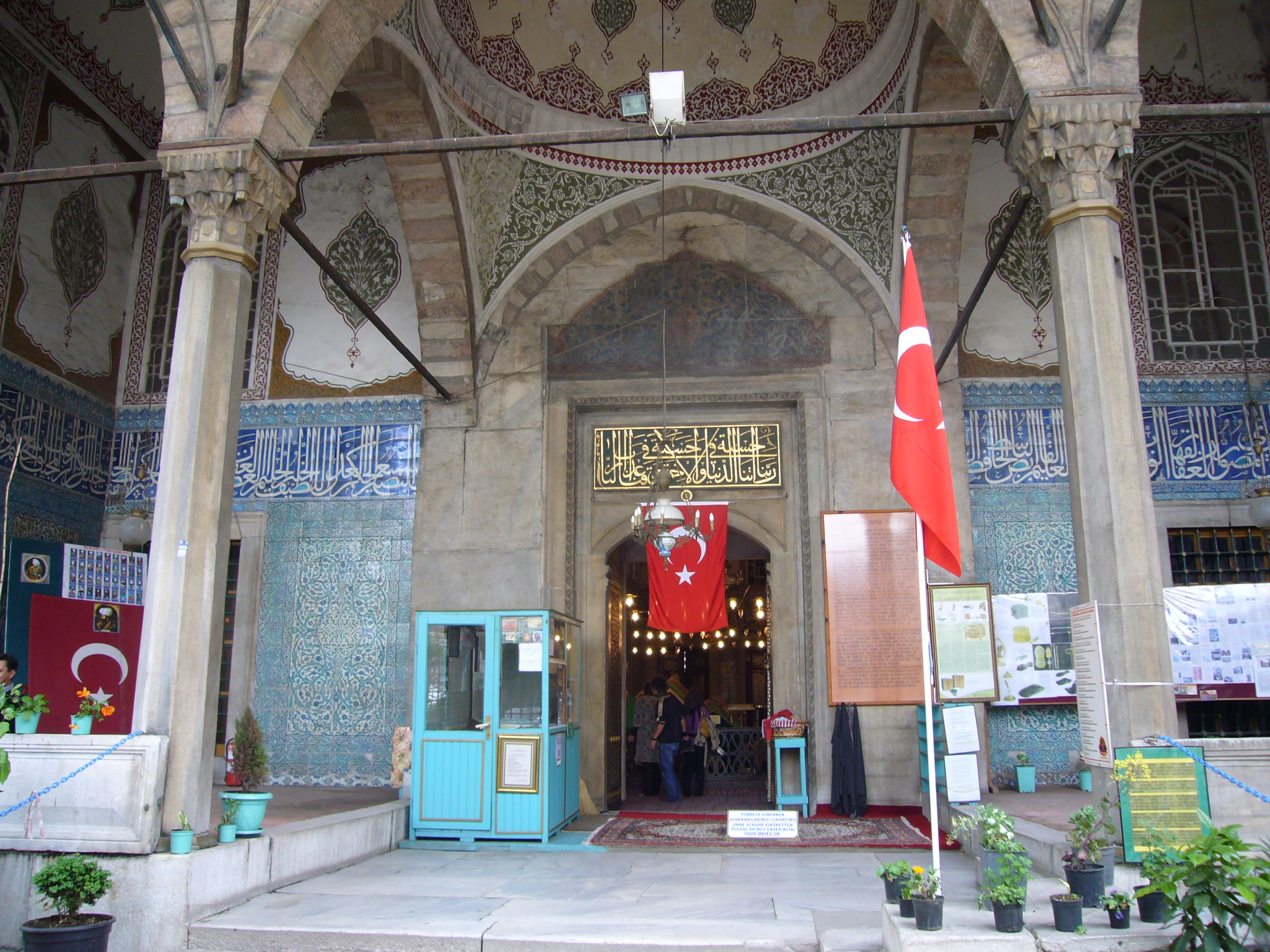 Istanbul, mausoleo di Turhan Hatice alla Yeni Cami, ingresso